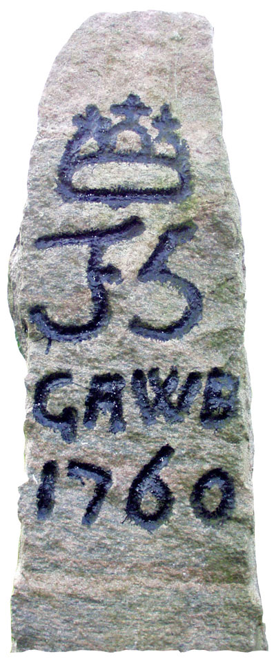 Jagdstein König Friedrich V.